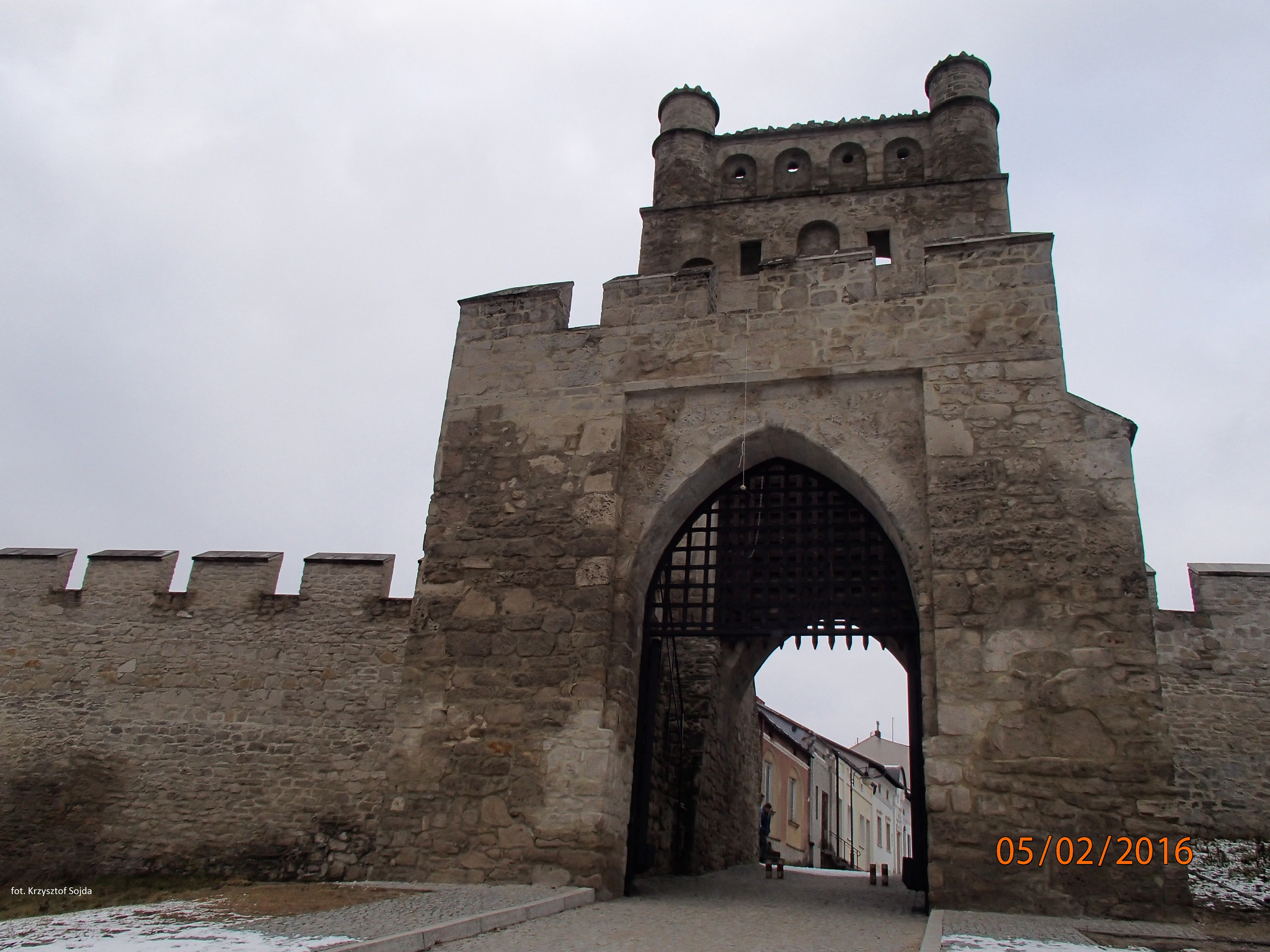 Widok średniowiecznej bramy miejskiej wraz z fragmentem murów.